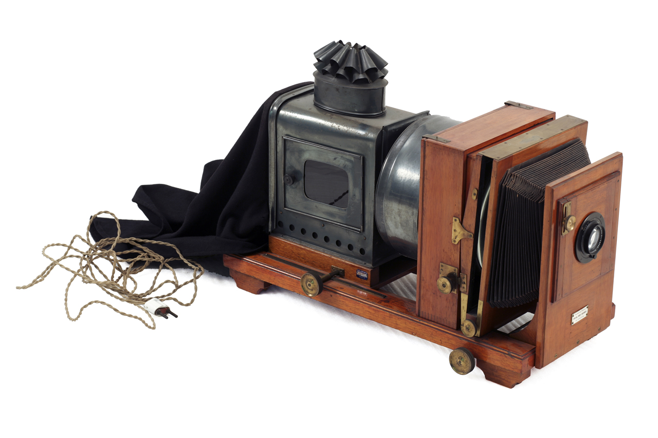 Questo apparecchio da proiezione da tavolo è costruito in metallo e legno È costituito da una lanterna alimentata da una lampada elettrica, con camino e panno nero per non far uscire la luce bianca, corredata di una lente condensatrice e un apparecchio fotografico a soffietto quadrato con messa a fuoco a doppia cremagliera All'interno della lanterna è inserita una luce elettrica costituita da una lampadina montata su un portalampada inserito nella base Dal portalampada fuoriesce il cavo elettrico per il collegamento alla rete elettrica. Funzione Proiezione di immagini fotografiche trasparenti per la loro riproduzione in una scala maggiore dell'originale È possibile utilizzarlo per immagini opache con risultati meno apprezzabili. Modalità d'uso Si inserisce la lastra fotografica impressionata, nell'apposito porta lastre dell'apparecchio fotografico, si accende la lampada della lanterna La lente condensatrice fa convergere la luce della lampada sulla lastra Ruotando le rotelle che regolano lo spostamento dell'apparecchio lungo le cremagliere, si proce alla messa a fuoco dell'immagine proiettata A questo punto si ottiene l'immagine ingrandita che è possibile riprodurre su un nuovo supporto sensibile, negativo o positivo.